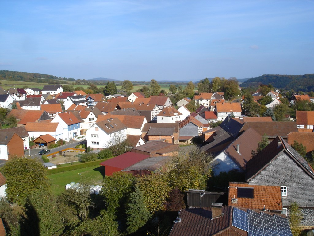 Densberg gesehen vom Kirchturm